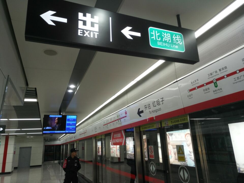 长春地铁北环站站台